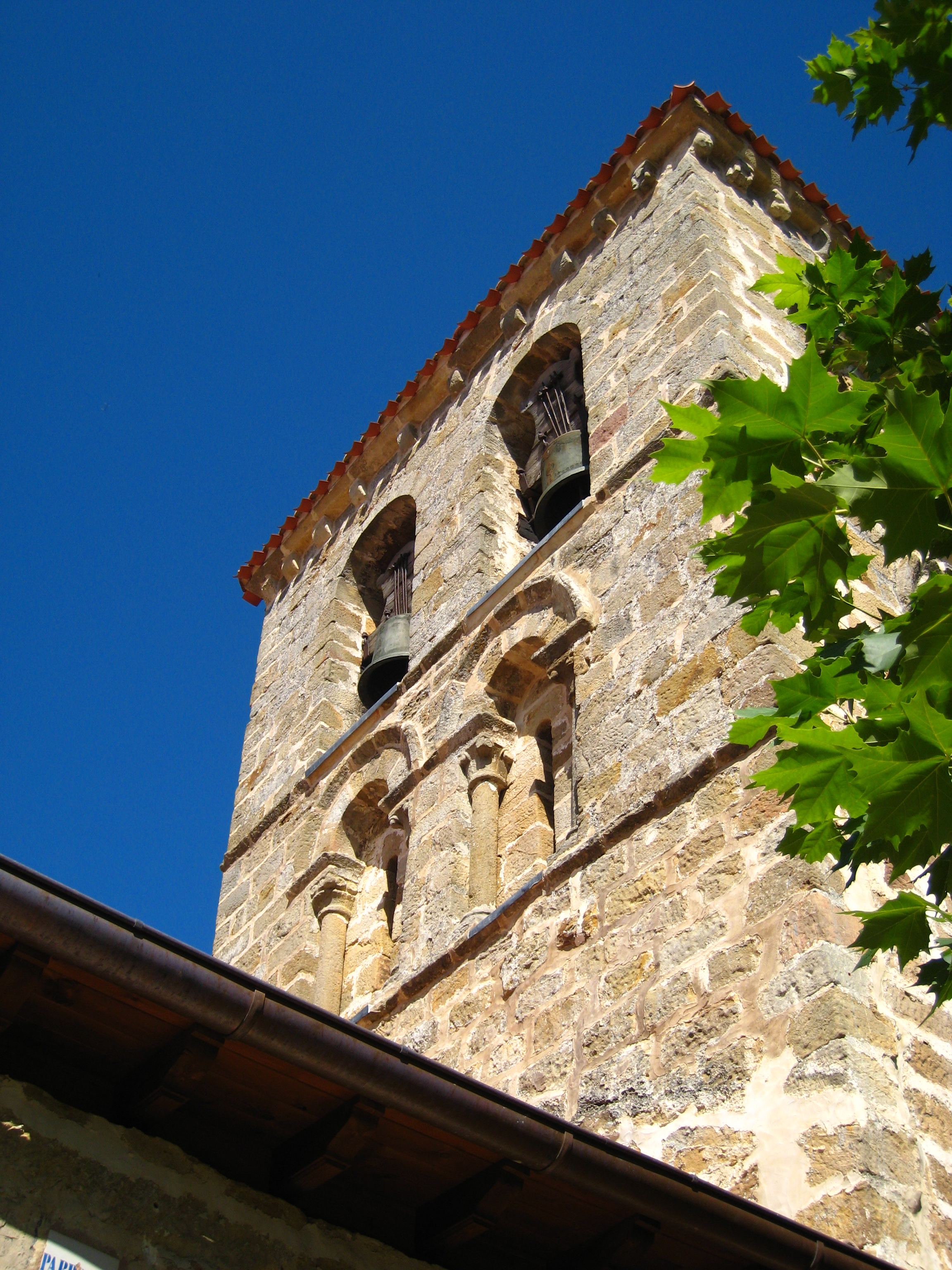 Imagen de San zadornil, Burgos.